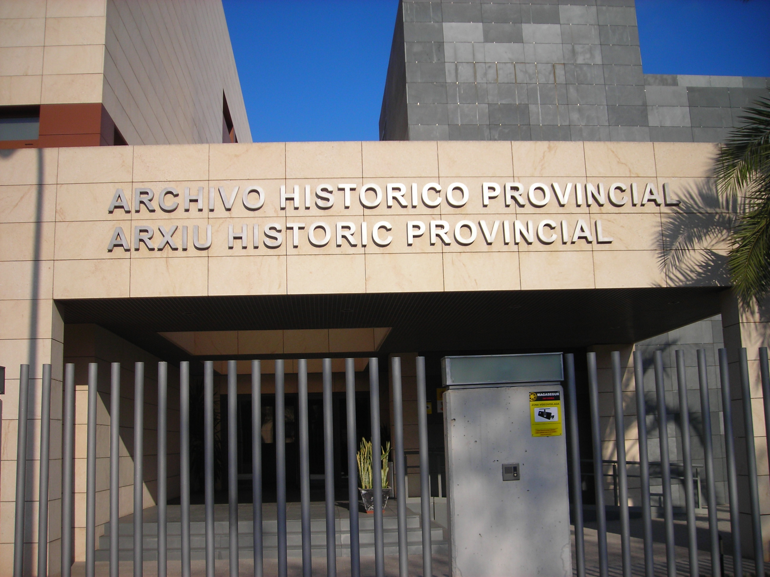 Entrada del archivo histórico de Alicante. Declarado bien de interés cultural con el código RI-AR-0000013